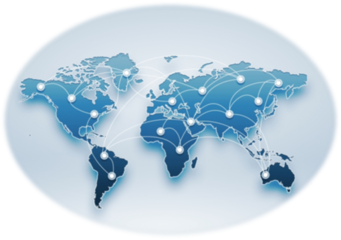 Неомарксистская традиция в американской науке международных отношений.